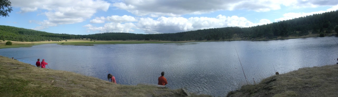 Lac de Barandon, Mont Lozère